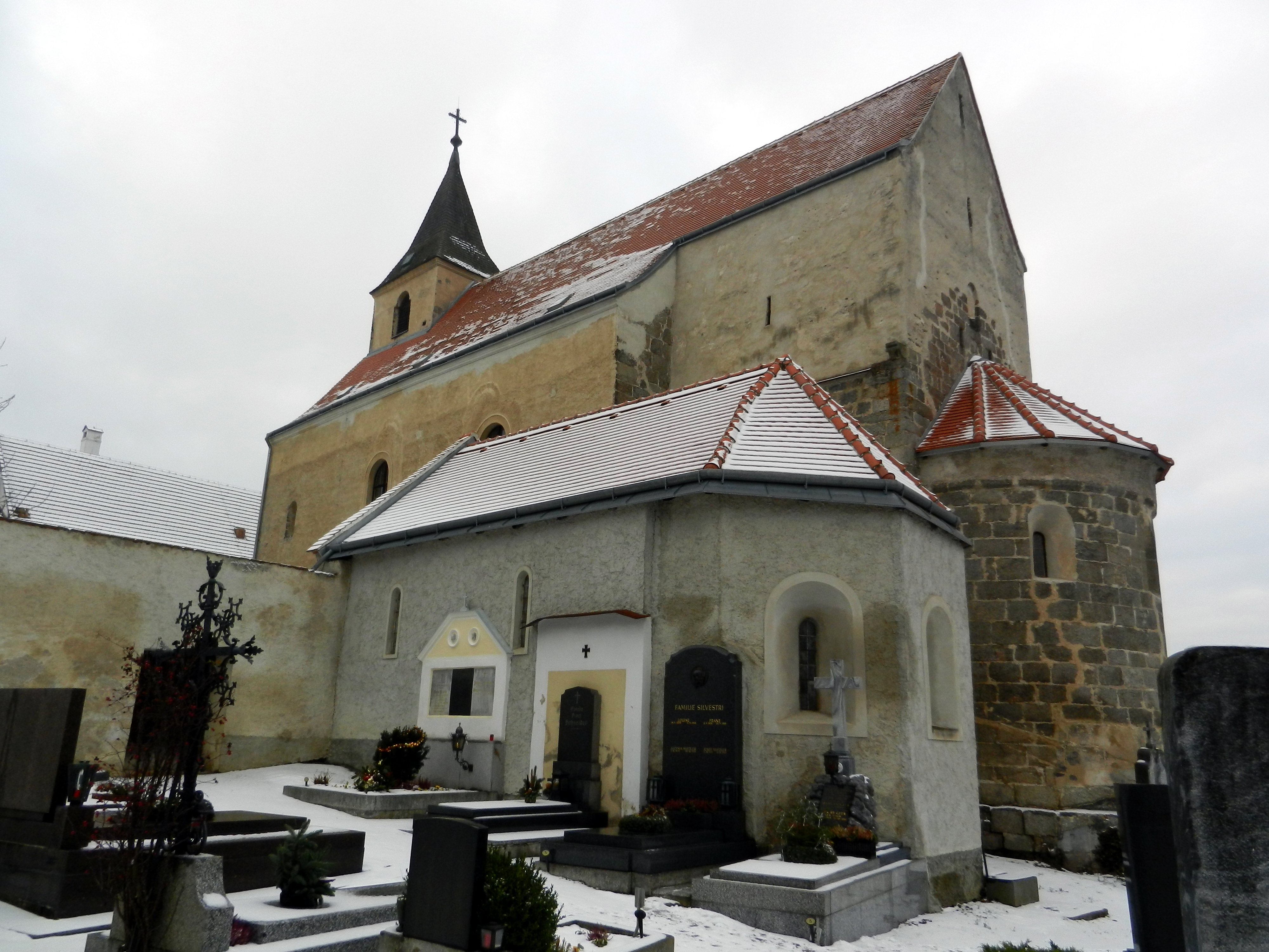 Zwettler Propsteikirche mit Michaelskapelle